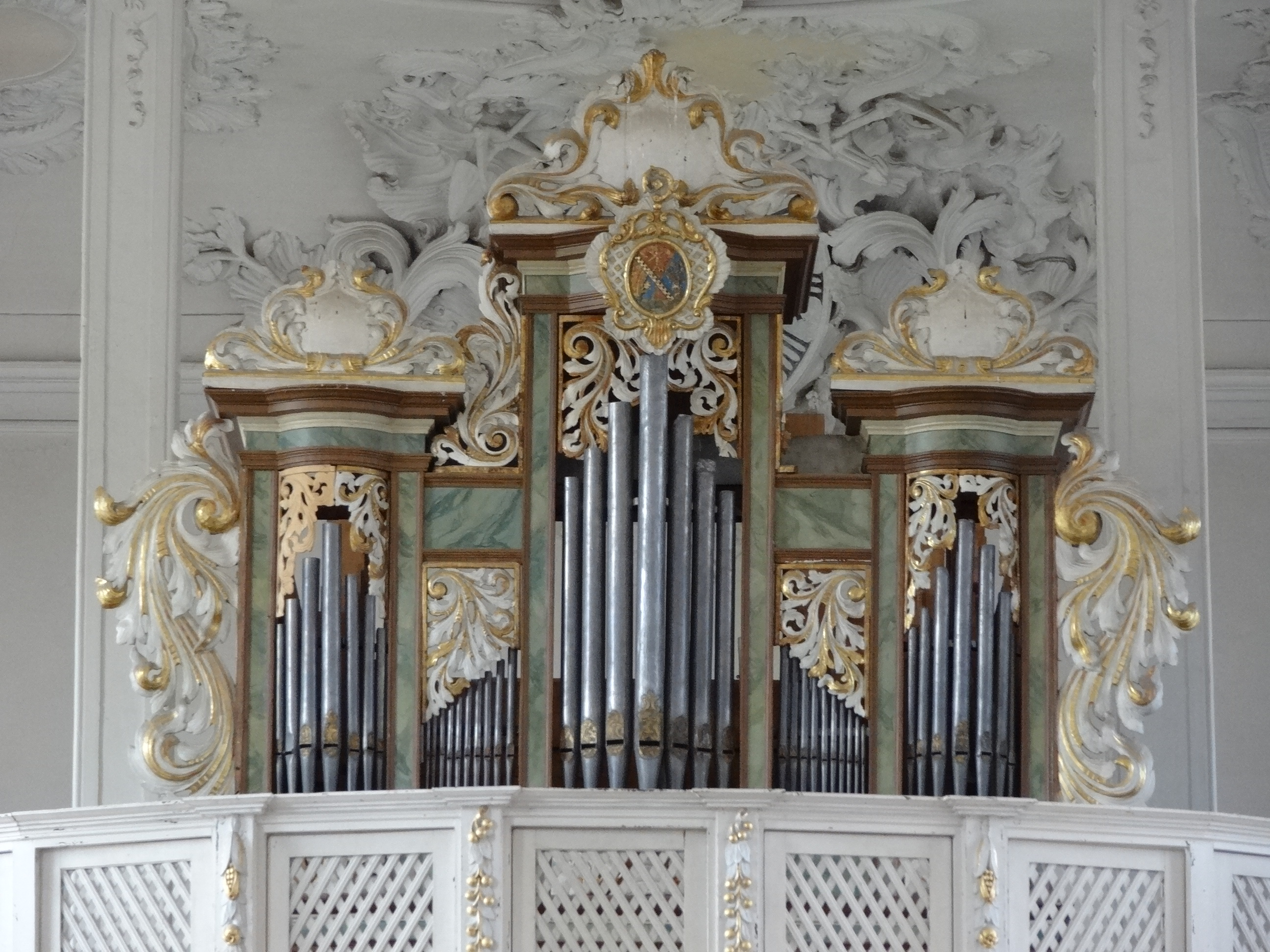 Klosterkirche (JVA Rockenberg)